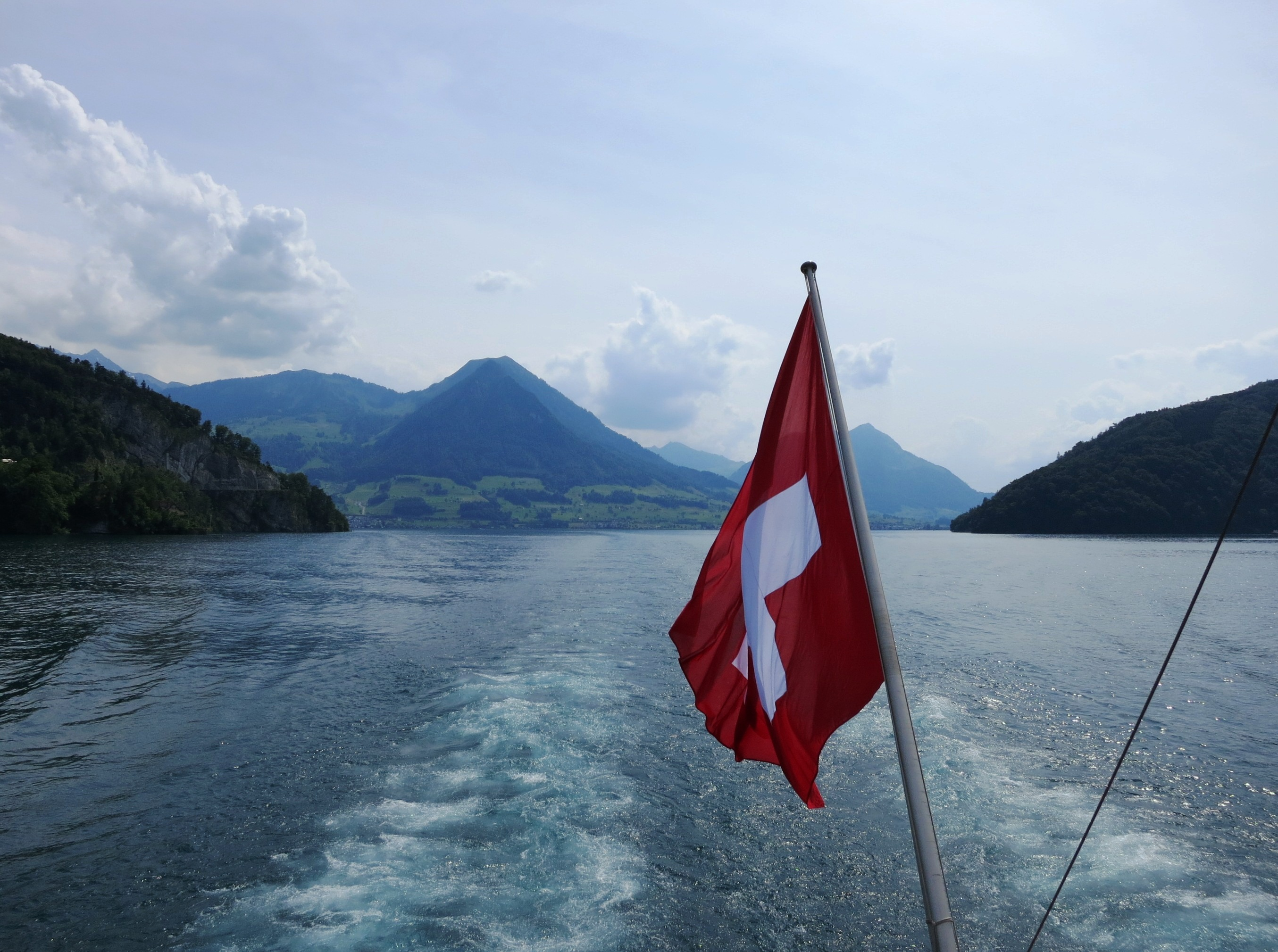 Obere und Untere Nas, Vitznau LU, Schweiz